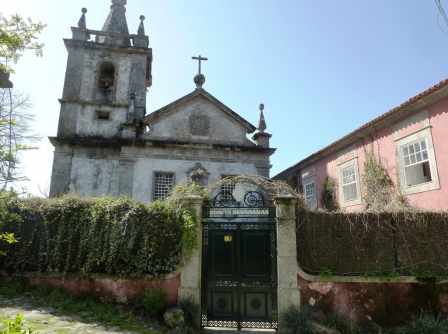 Convento de São João de Cabanas